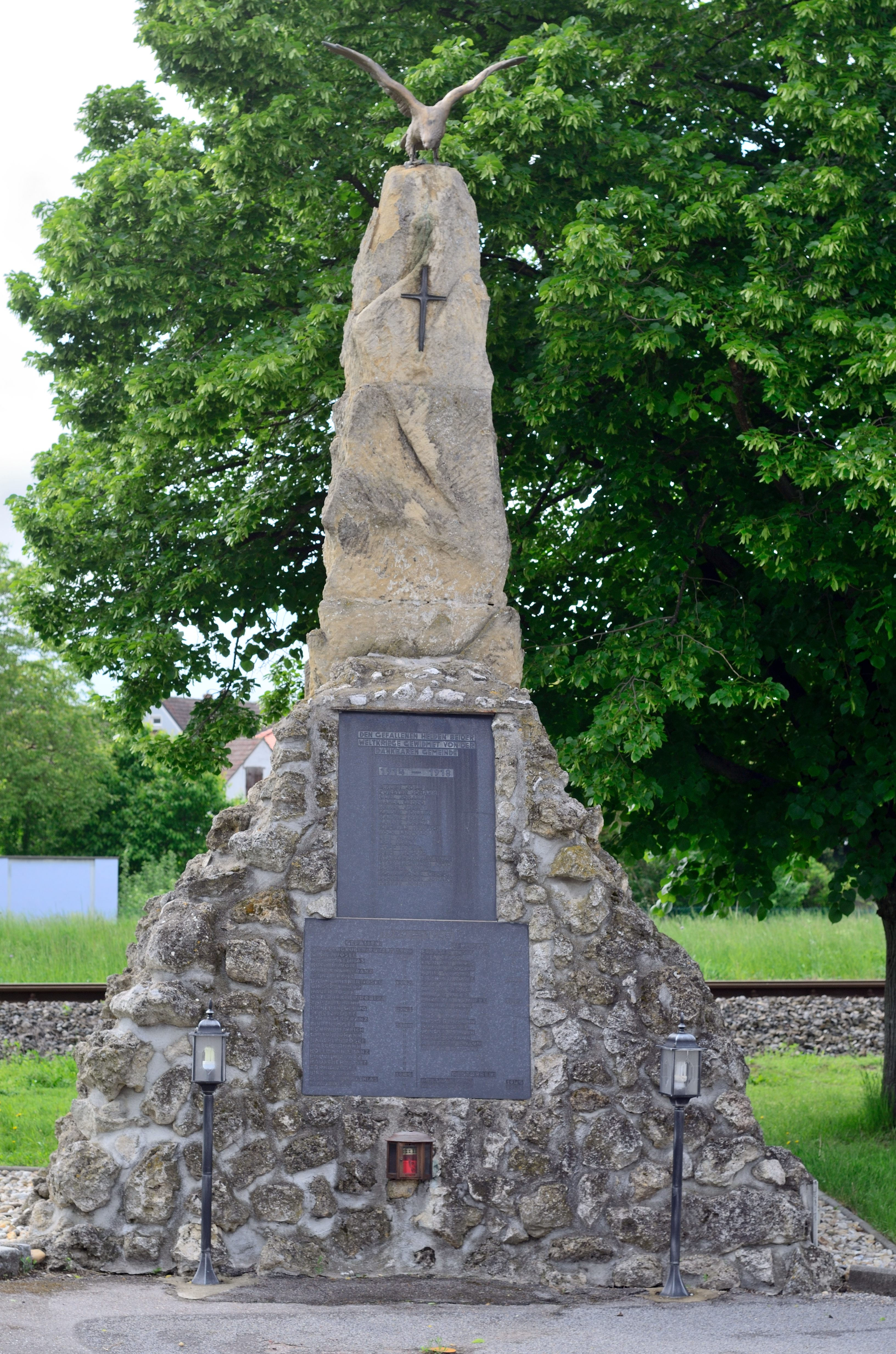 Hauskirchen, Kriegerdenkmal